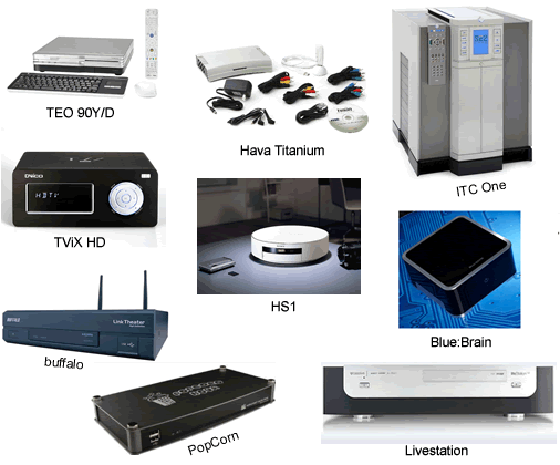 Exemples de centres multimèdia